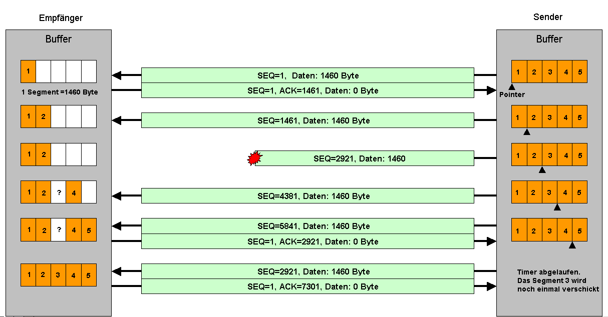 TCP Datentransfer